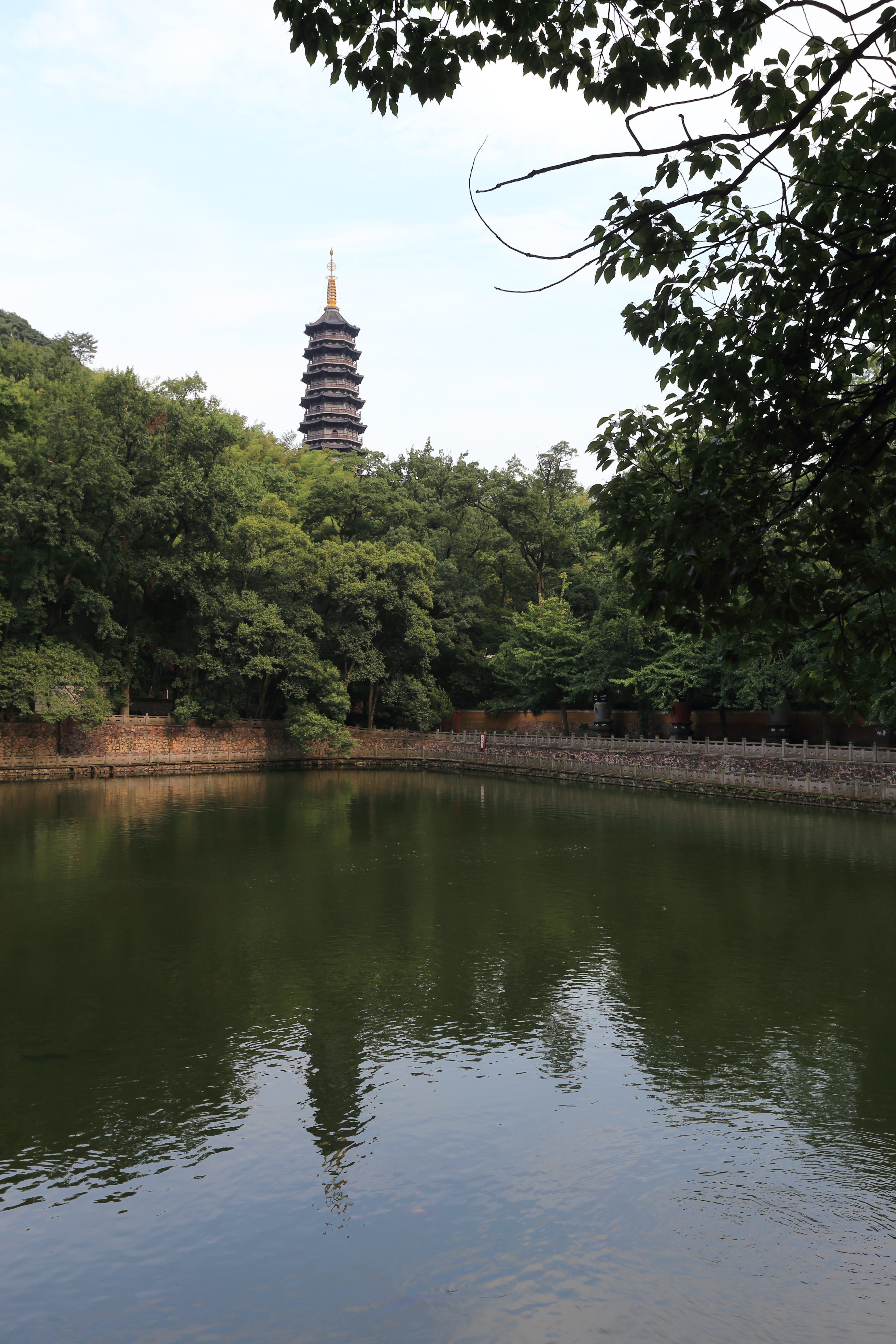 宁波天童寺 —— 万工池和千佛塔